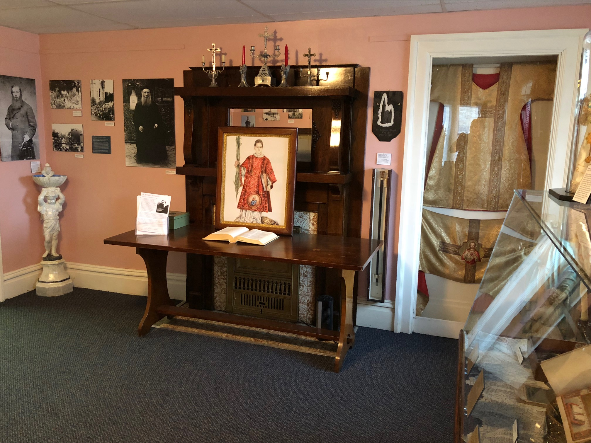 Pittsburgh, l'icona di San Cesario diacono e martire esposta permanentemente nel Museo Fr. Suitbert G. Mollinger (Chapel Museum), St. Anthony's Chapel